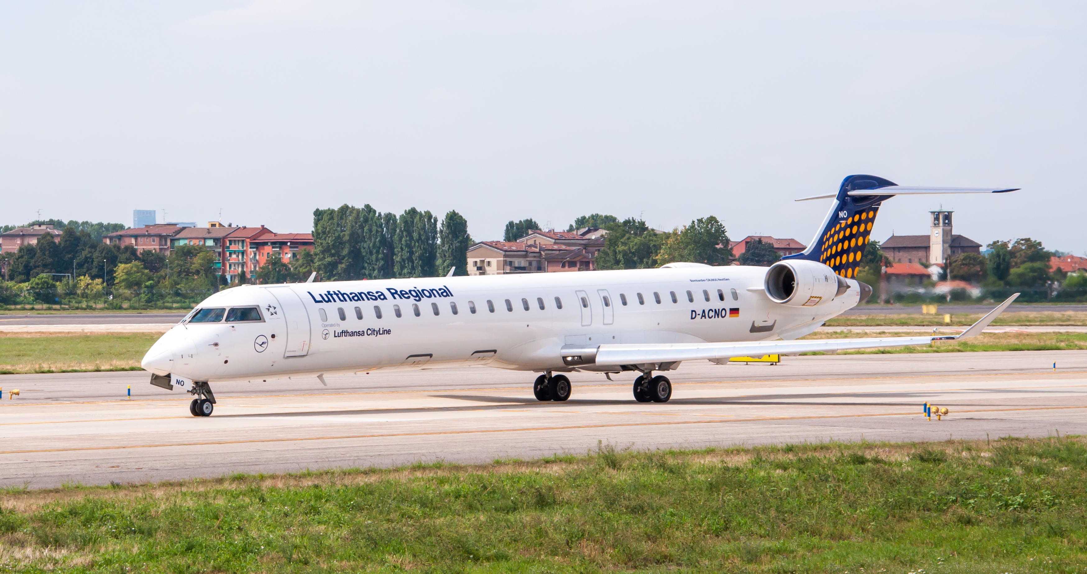 D-ACNO Bombardier CRJ-900LR NextGen Lufthansa Regional all'Aeroporto di Milano Linate